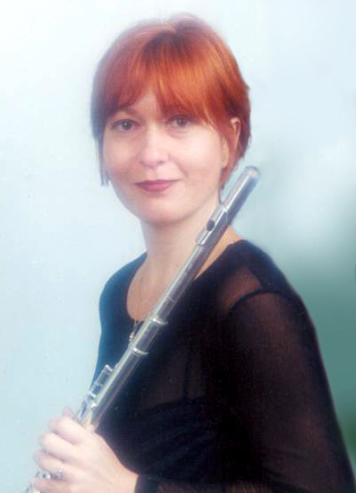 Retrato de Diana López Moyal